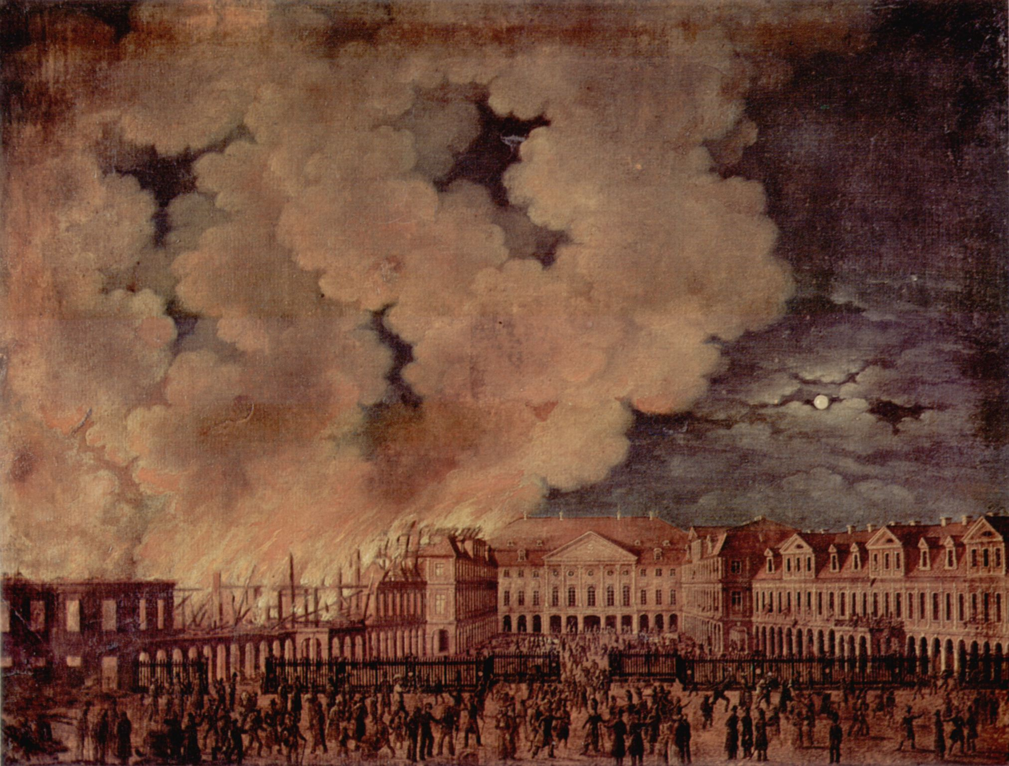 Karl Schröder: Braunschweig, Schlossbrand von Westen.